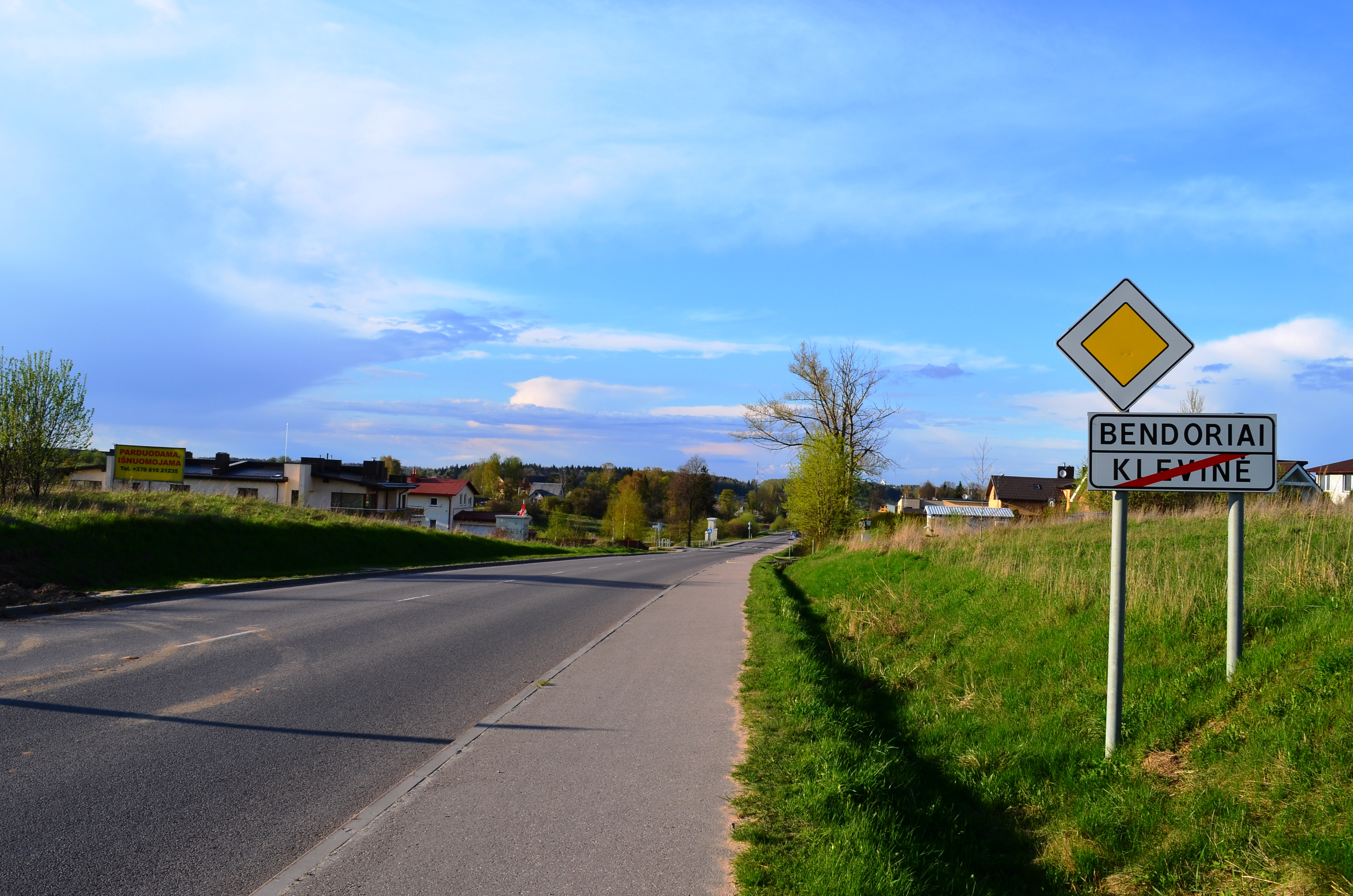 Bendoriai, Vilniaus raj.